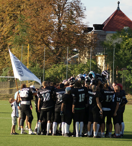 BadBones Köszöntés